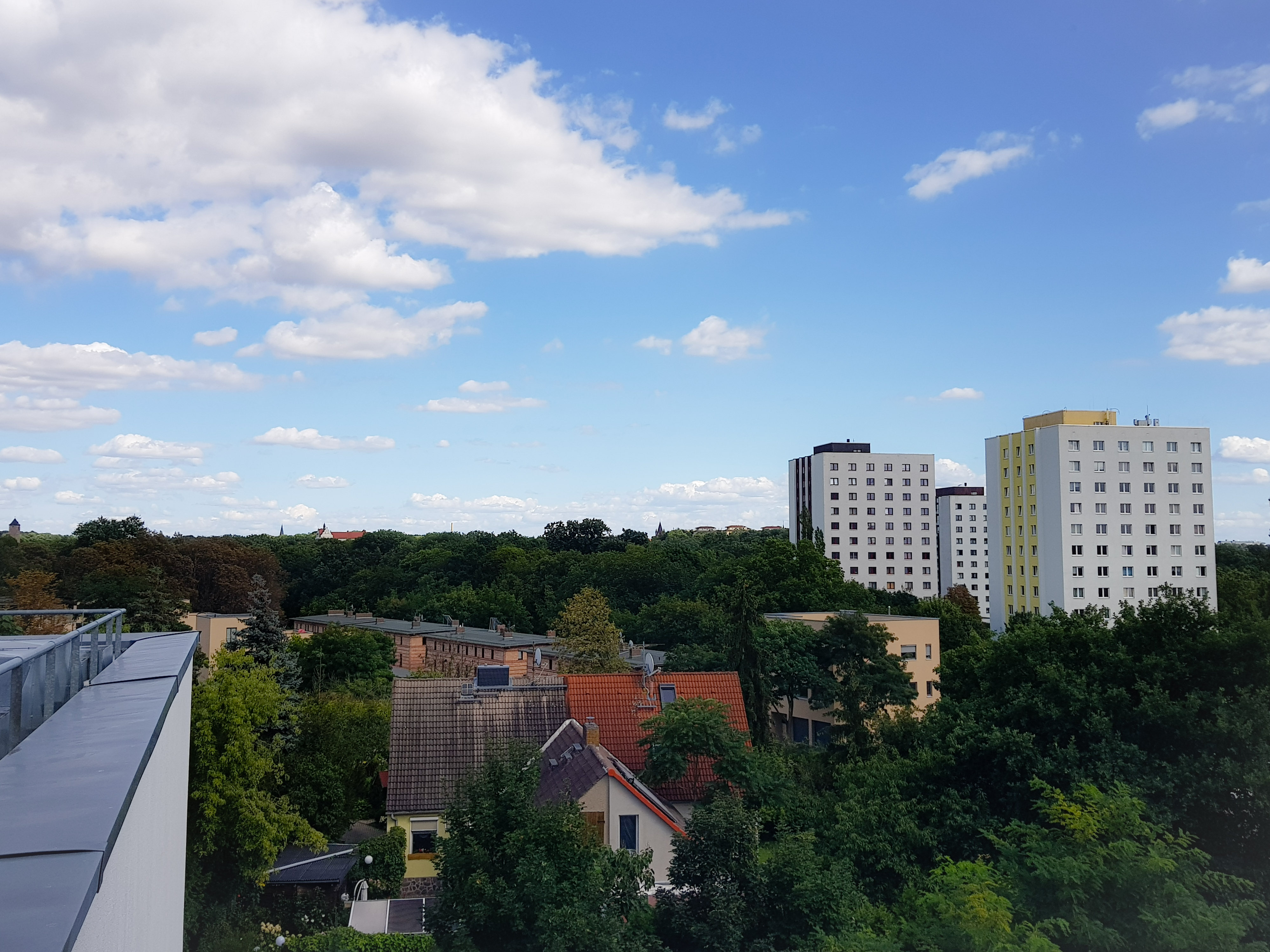 Die Hochhäuser werden als Studentenwohnheime genutzt. Fotografiert von Universitätsklinikum Halle